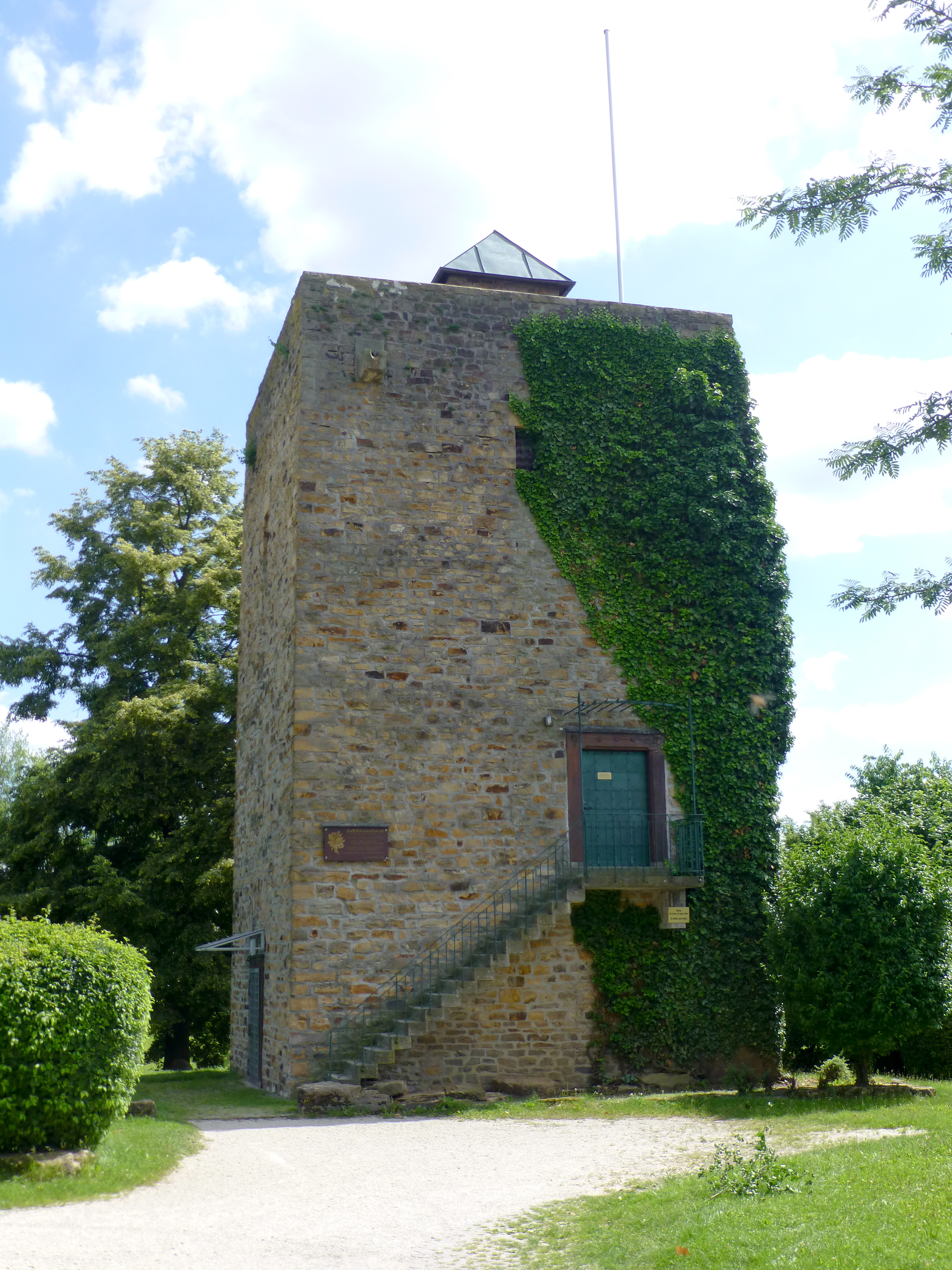 Jubiläumsturm (Plochingen); Ansicht von Norden mit dem Treppenaufgang zum Hocheingang